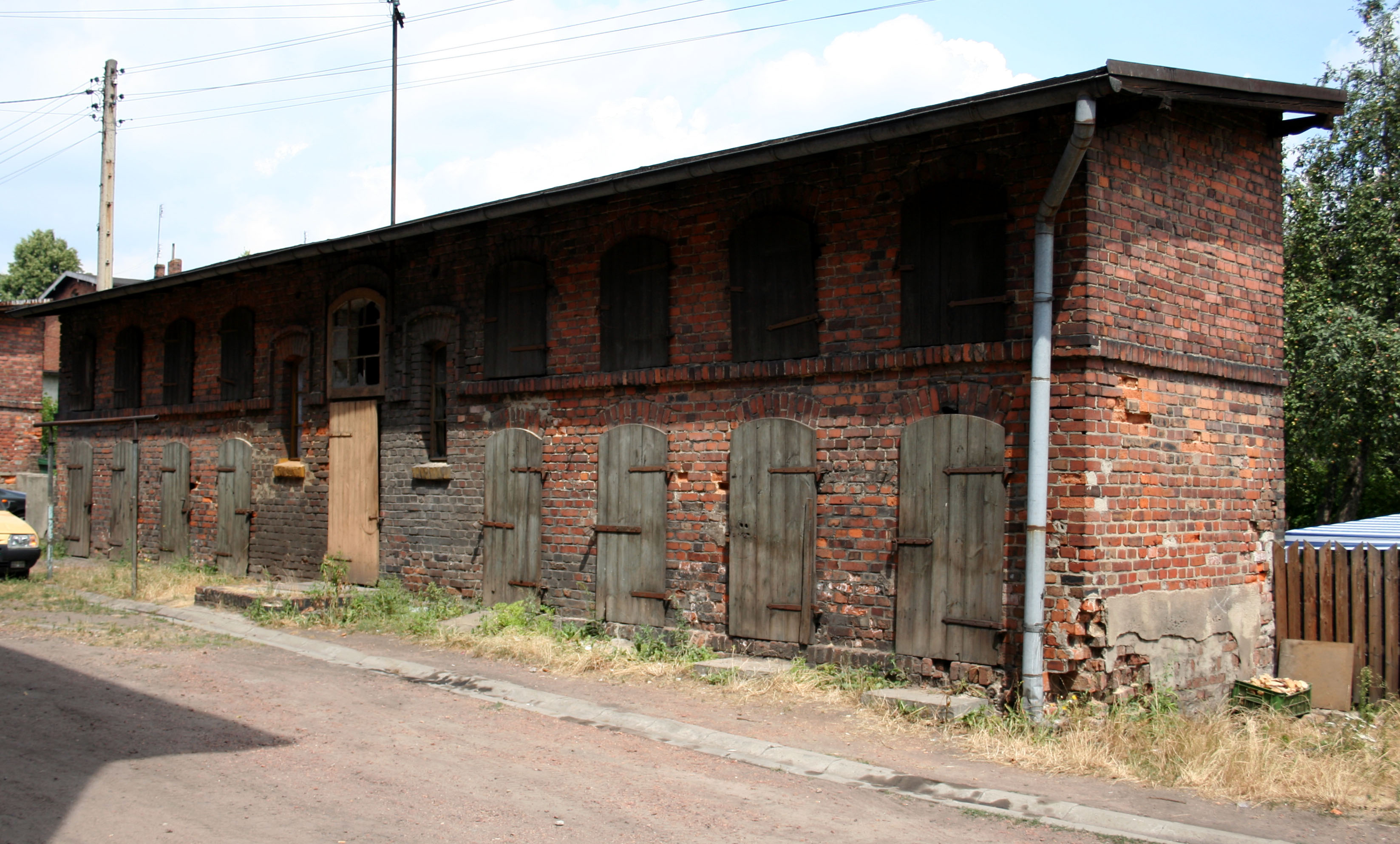 budynek gospodarczy przy familokach w Rybniku-Chwałowicach